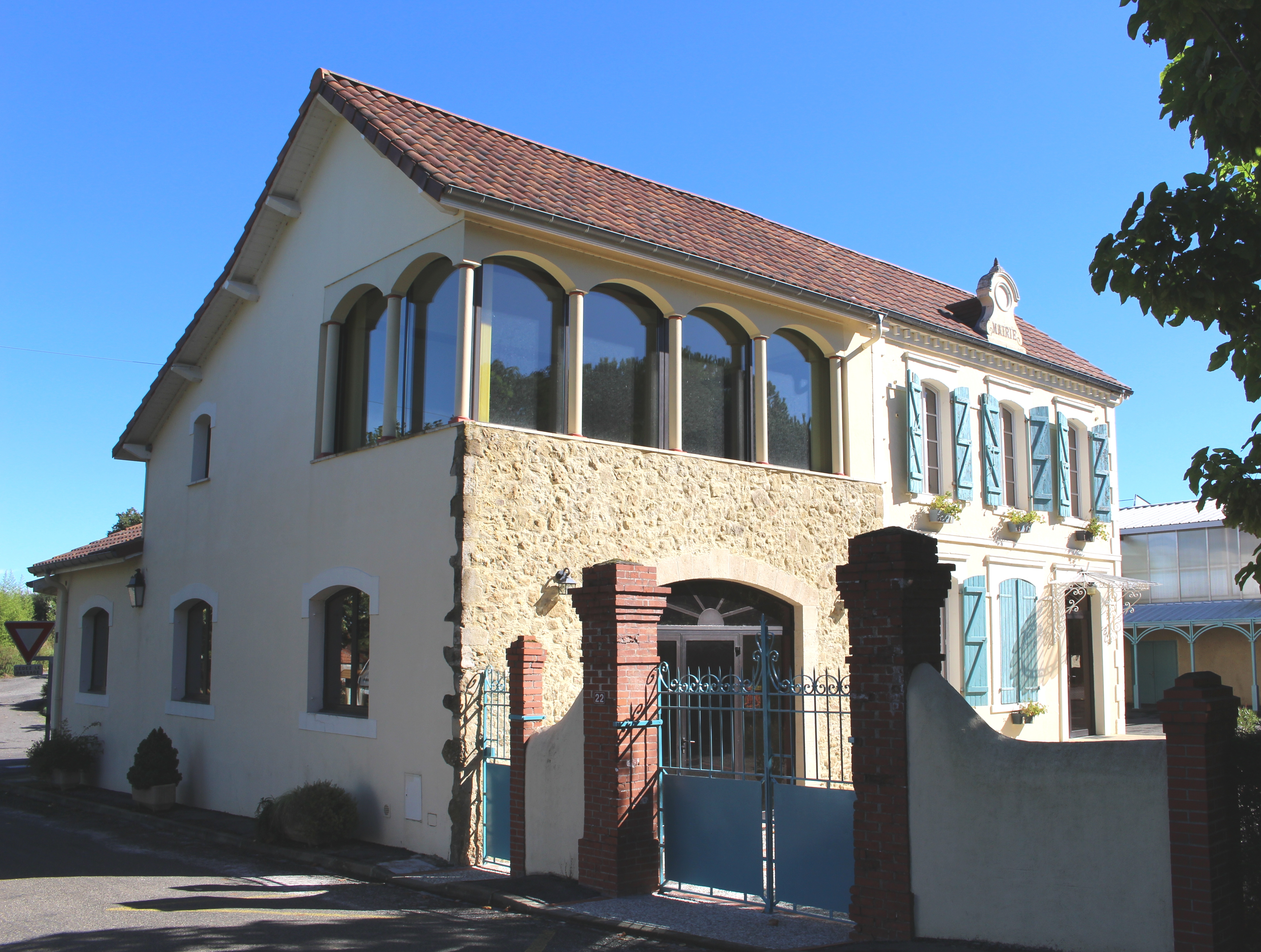 Mairie de Monfaucon (Hautes-Pyrénées)